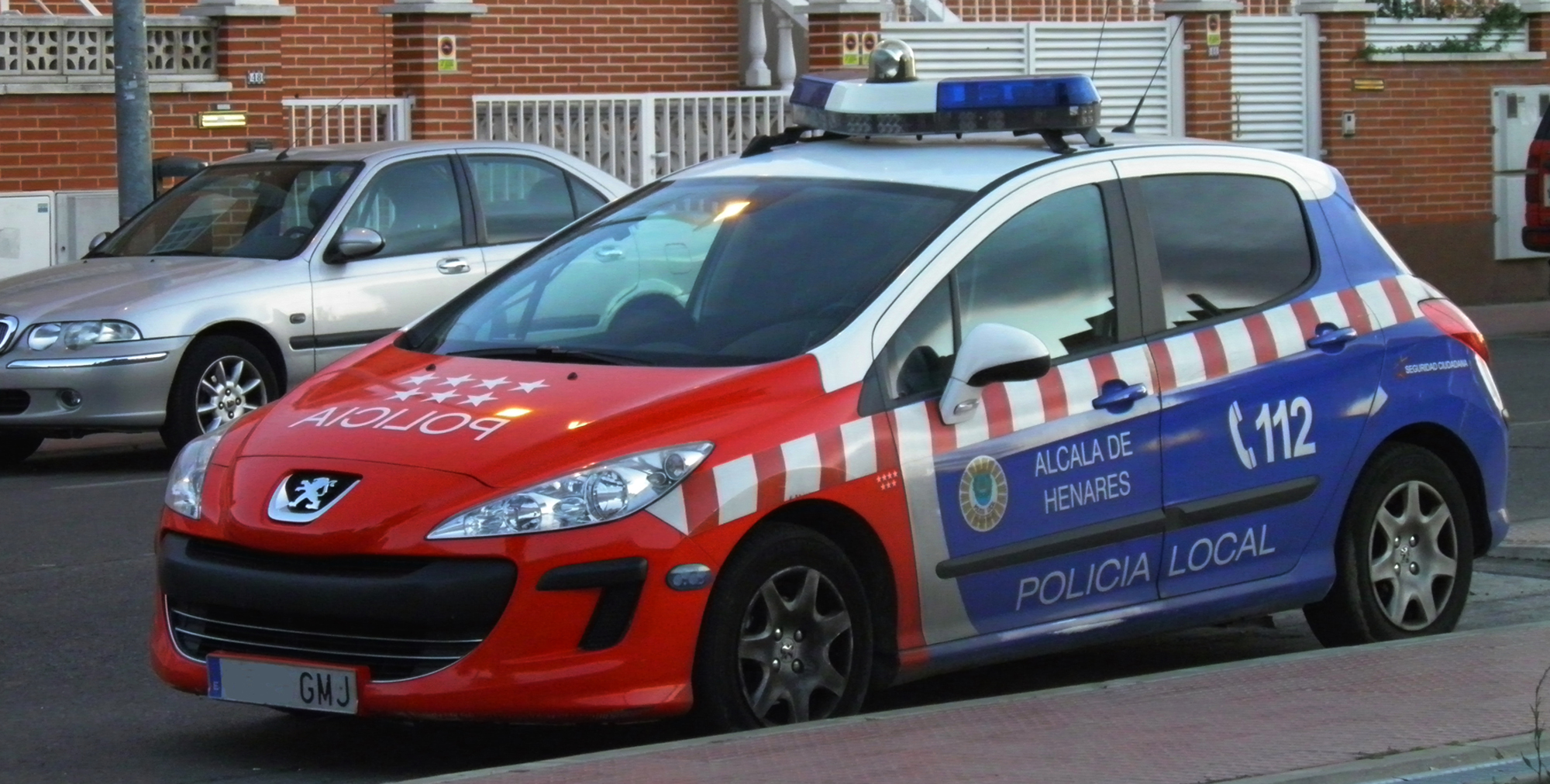 Coche BESCAM, Alcalá de Henares, Comunidad de Madrid, España